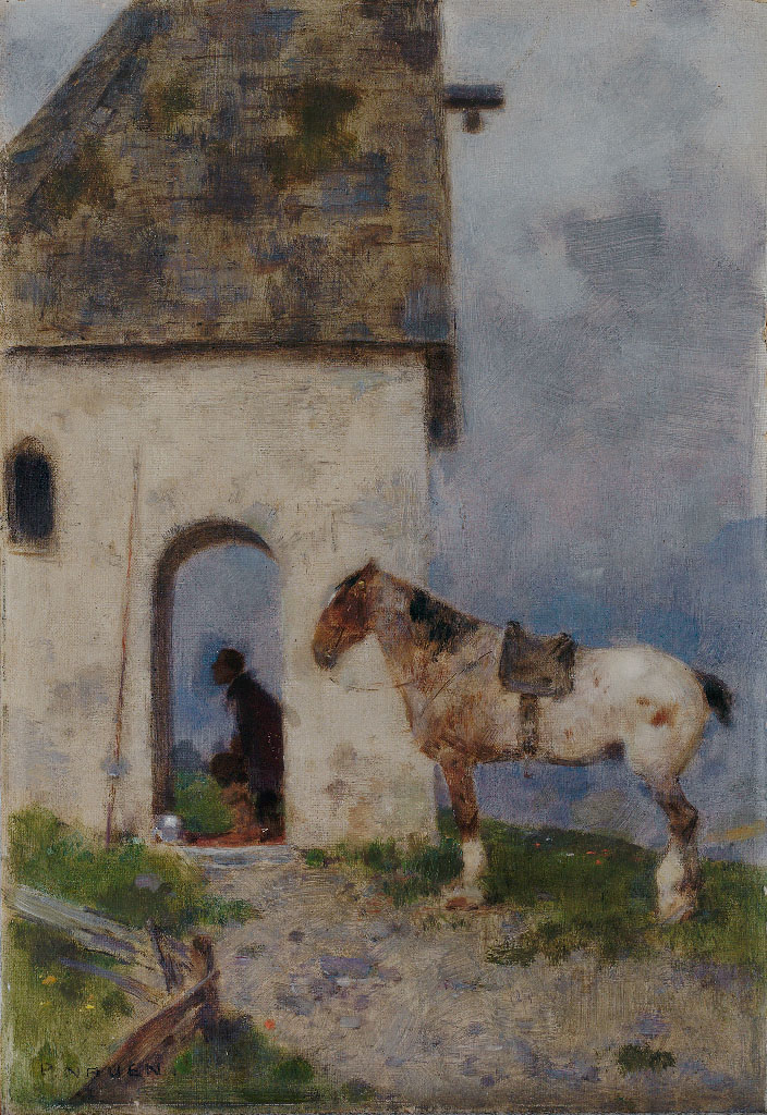 Paul Nauen (1859–1932): "Kriegerandacht" (rückseitig betitelt); Öl/Ktn. 34,5 x 23 cm